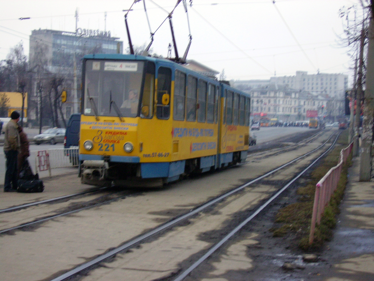 Tram in Vinnytsya, Ukraine